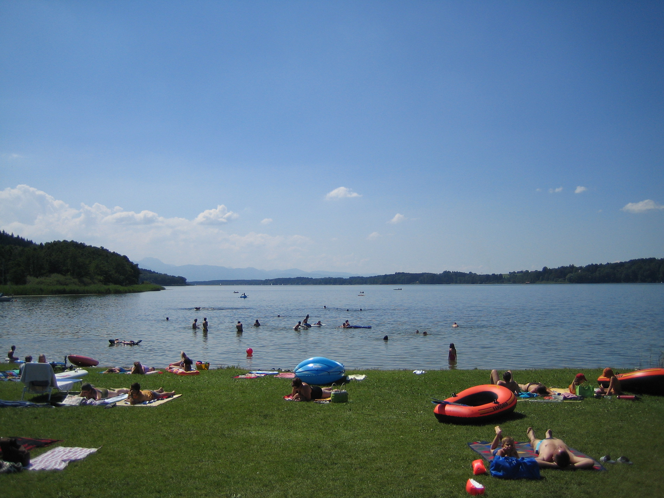 Der Simssee. Blick von einem hiesigen Campingplatz. Selbst fotografiert am 12. August 2005.